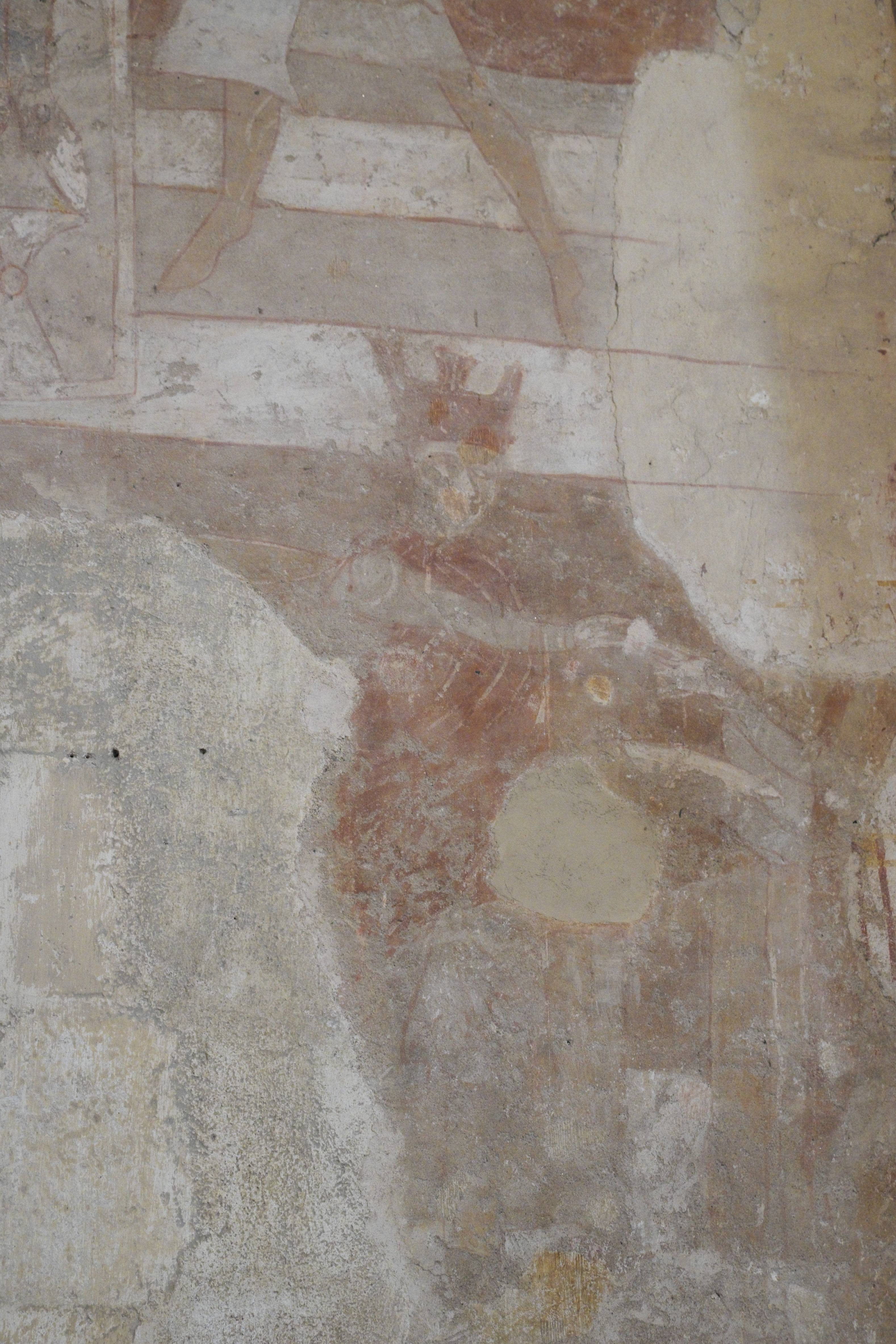 Kirche von Saint-Pierre-les-Églises in Chauvigny im Département Vienne (Nouvelle-Aquitaine/Frankreich), Wandmalereien